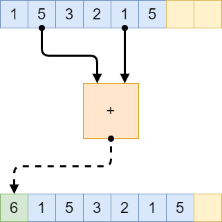 Vöölt väärtuste lugemine summeerimine ja summa vööle lisamine